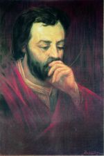 Դավիթ Անհաղթ